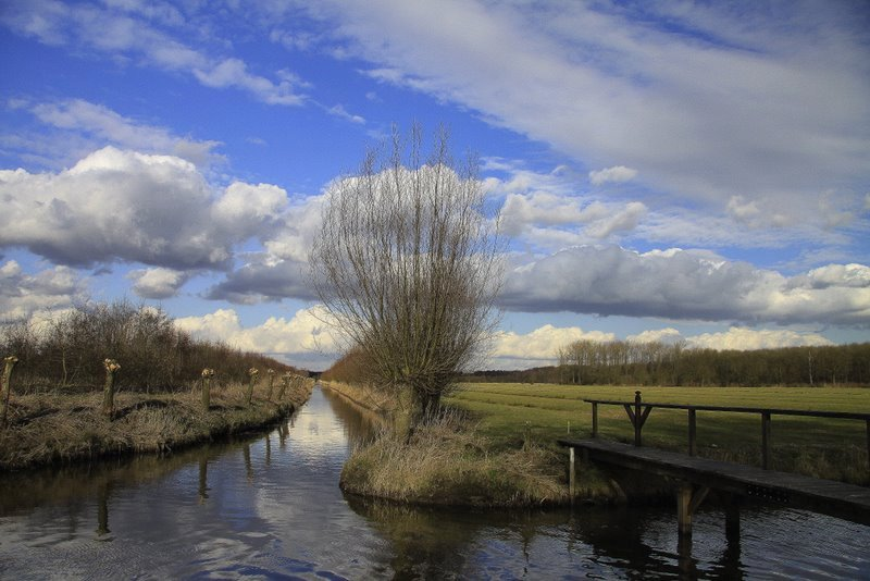 Een prachtig coulisselandschap vinden we langs de Langbroekerwetering, gelegen tussen Odijk en Wijk bij Duurstede. Met langs de Wetering de plaatsen Langbroek en Overlangbroek met aan weerszijden verschillende kastelen en buitenplaatsen. Een heerlijk gebied om te wandelen en van de natuur te genieten. Informatie V.V.V. Wijk bij Duurstede.